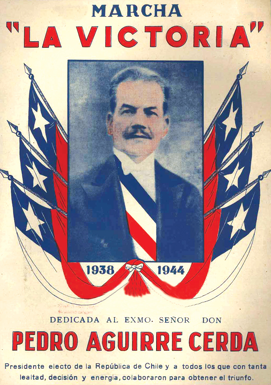 Pedro Aguirre Cerda, Presidente de Chile.